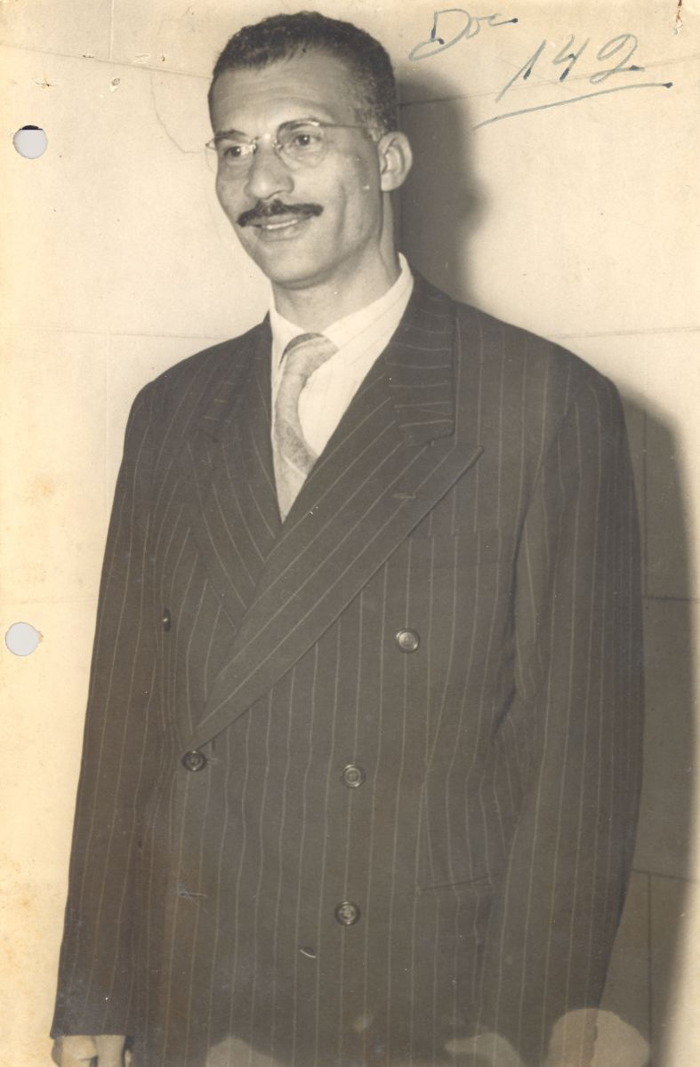 Marighella quando era deputado, em 1946 ou 1947.